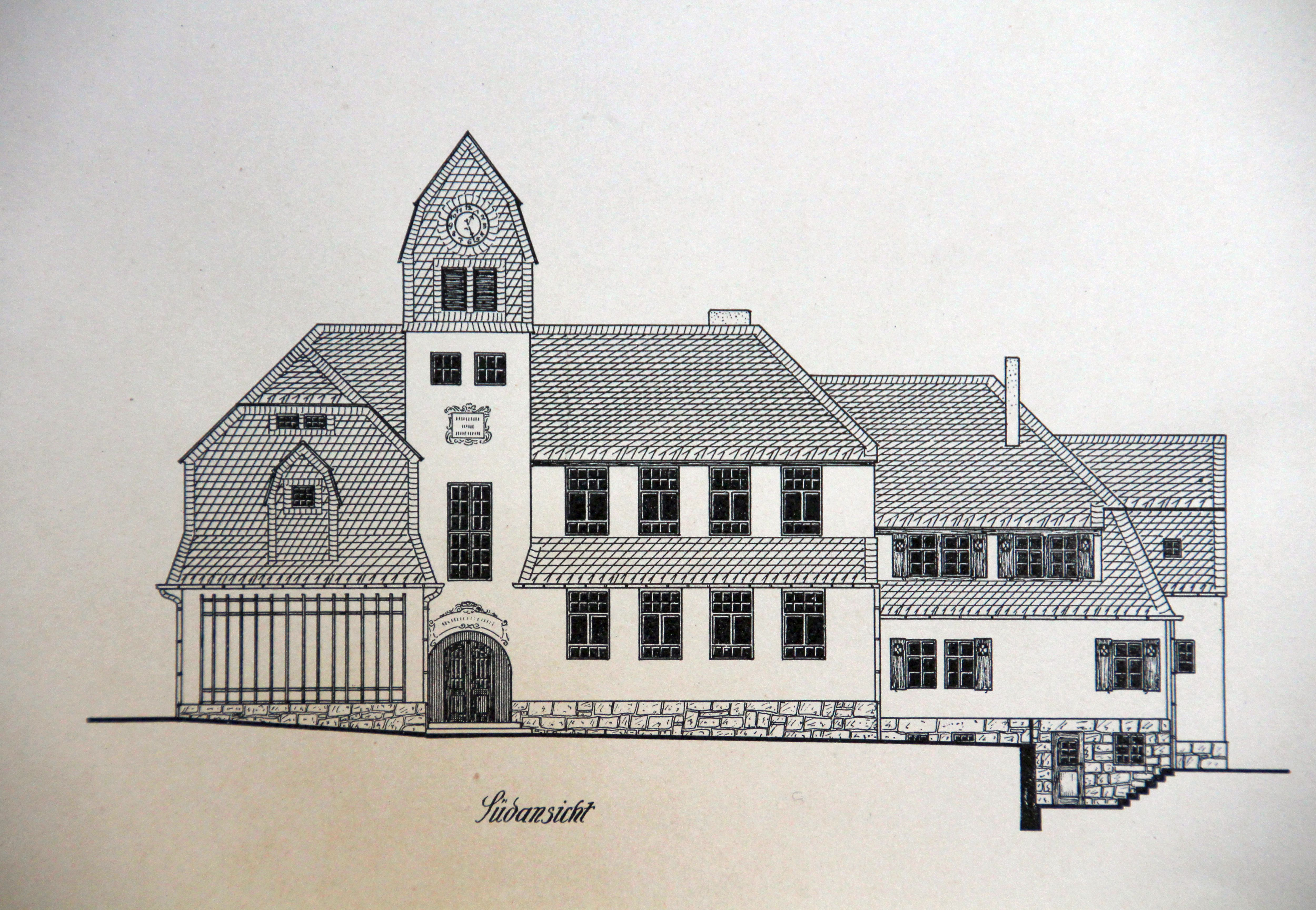 „Hammerschule“ in Schönheiderhammer, seit 1949 Ortsteil von Schönheide im Erzgebirge. Die Schule wurde für die damals etwa 1.000 Einwohner umfassende Gemeinde im Jahr 1908 nach Plänen des Architekten August Grothe, Königlicher Baurat, Dresden, errichtet. Bei reinen Baukosten von 51.387,86 Mark machten die Nebenkosten 2.725,00 Mark, der Grunderwerb 5.000,00 Mark sowie die Architektenhonorare und sonstigen Gemeinkosten 3.887,00 Mark aus. Der Gesamtaufwand betrug 62.999,86 Mark. Dafür wurden auf zwei Etagen vier Klassenräume mit je 62 Quadratmeter, eine Spielhalle von 6 Meter mal 8,4 Meter, zwei Lehrmittelzimmer und Toilettenanlagen geschaffen. Zusätzlich entstand in diesem Gebäude mit eigenem Hauseingang und Treppenhaus eine unterkellerte Lehrerwohnung mit sieben Zimmern und einem Geräteraum auf zwei Etagen.Im Turm hing eine Glocke, die in der DDR-Zeit vom Turm genommen wurde und ungefähr seit der Zeit der 1960er/1970er Jahre unauffindbar ist.Der „Sächsische Heimatschutz – Landesverein zur Pflege heimatlicher Natur, Kunst und Bauweise“, Dresden, veröffentlichte in den ersten Jahrzehnten des 20. Jahrhunderts im Verlag von Gerhard Kühtmann, Dresden, eine Serie „Neuere ländliche Bauten in Sachsen“. Die Tafel 20 (50 Zentimeter breit und 37,5 Zentimeter hoch) ist gewidmet der „Gemeindeschule in Schönheiderhammer i. Erzgeb.“ Sie enthält Pläne, Schnitte und Ansichten der Schule von Süden und Osten sowie eine Übersicht über die Baukosten.